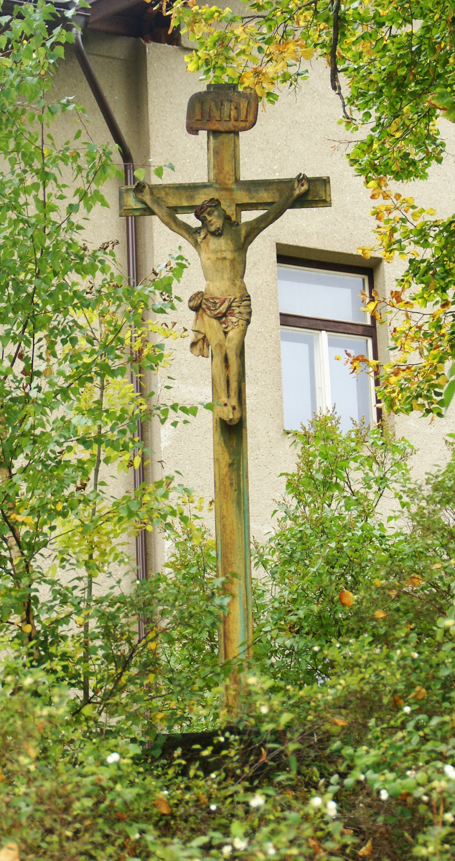 Krucifix (Roprachtice), při škole, Roprachtice